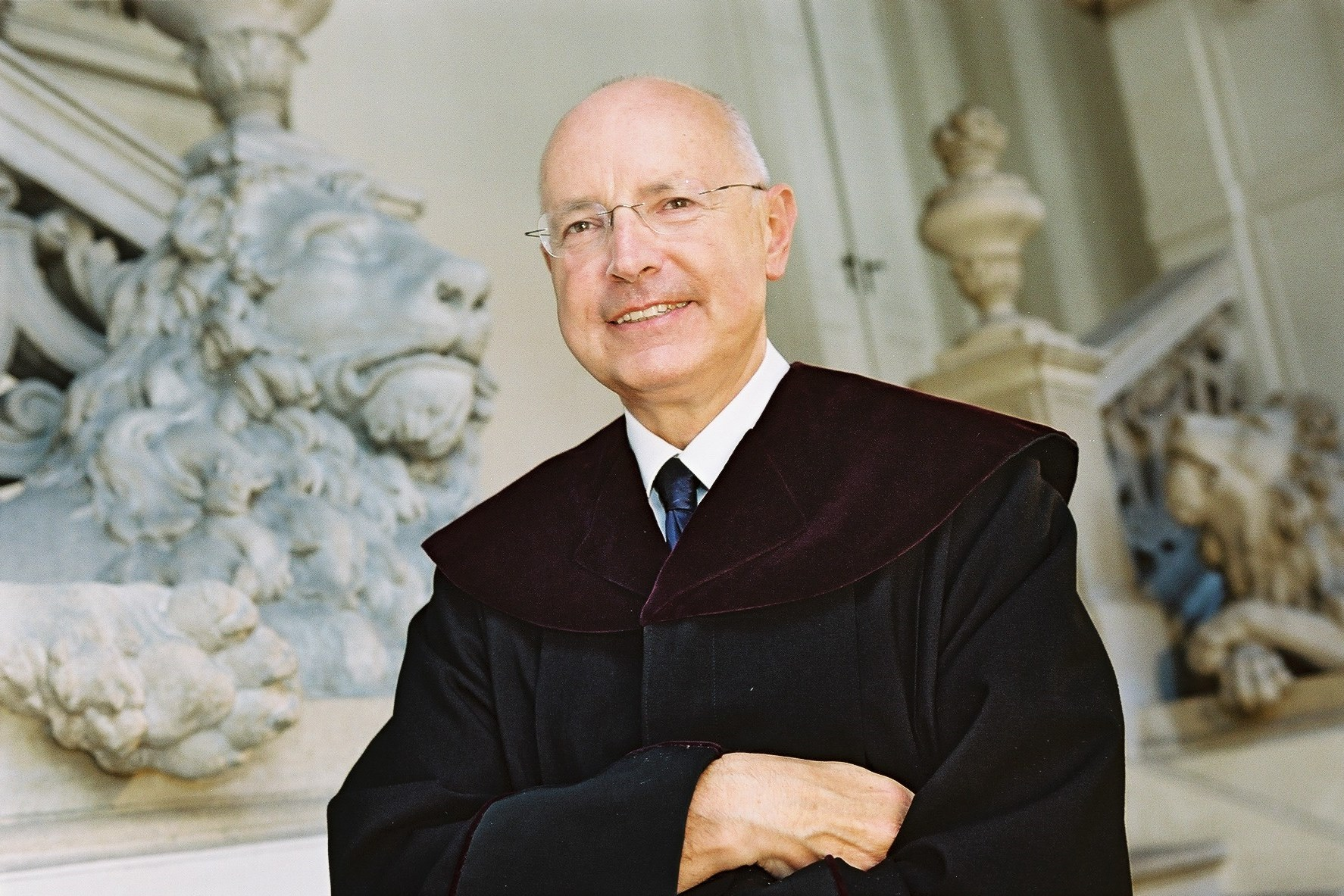 Dr. Peter Oberndorfer ist ein österreichischer Jurist und ehemaliger Verfassungsrichter. Hier auf einem Bild aus dem Jahr 2003.